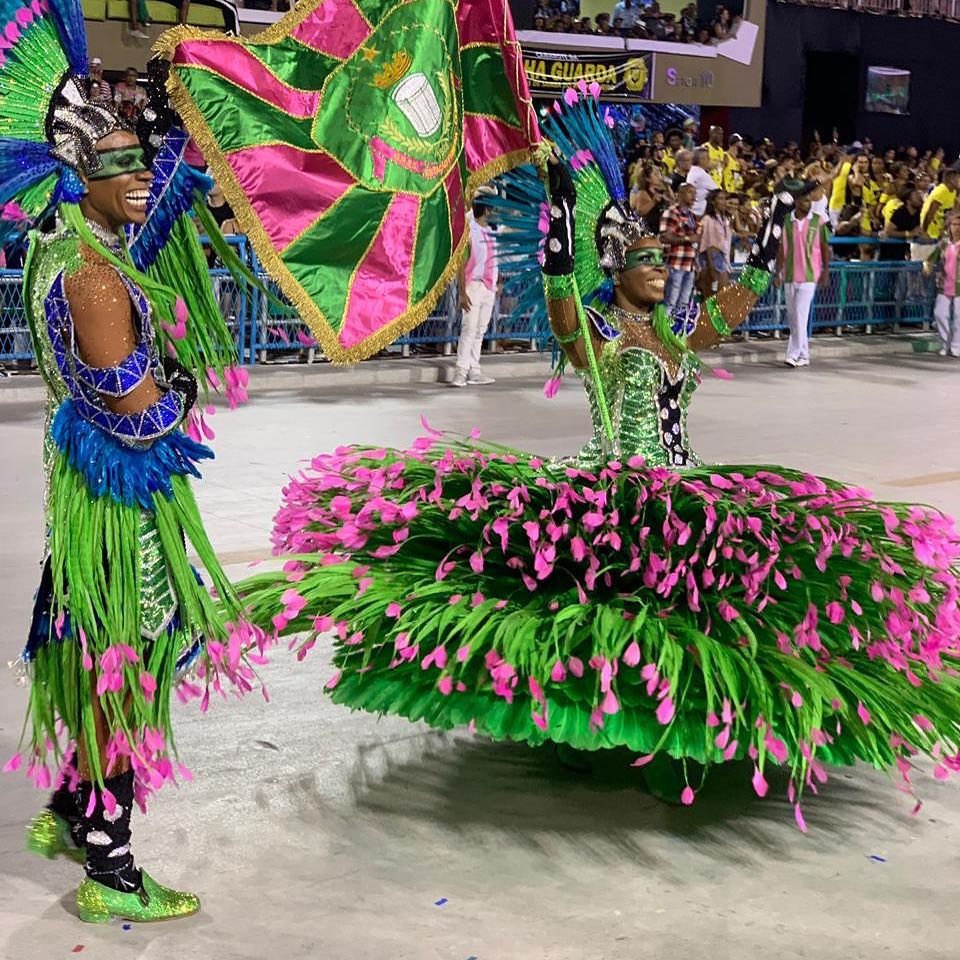 Sobre o carnaval: Mangueira espetacular